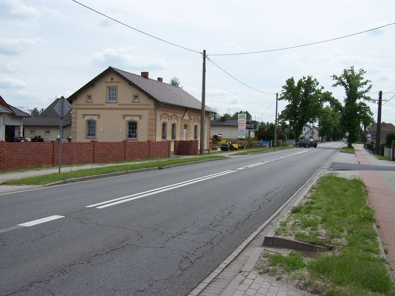 ul. Opolska